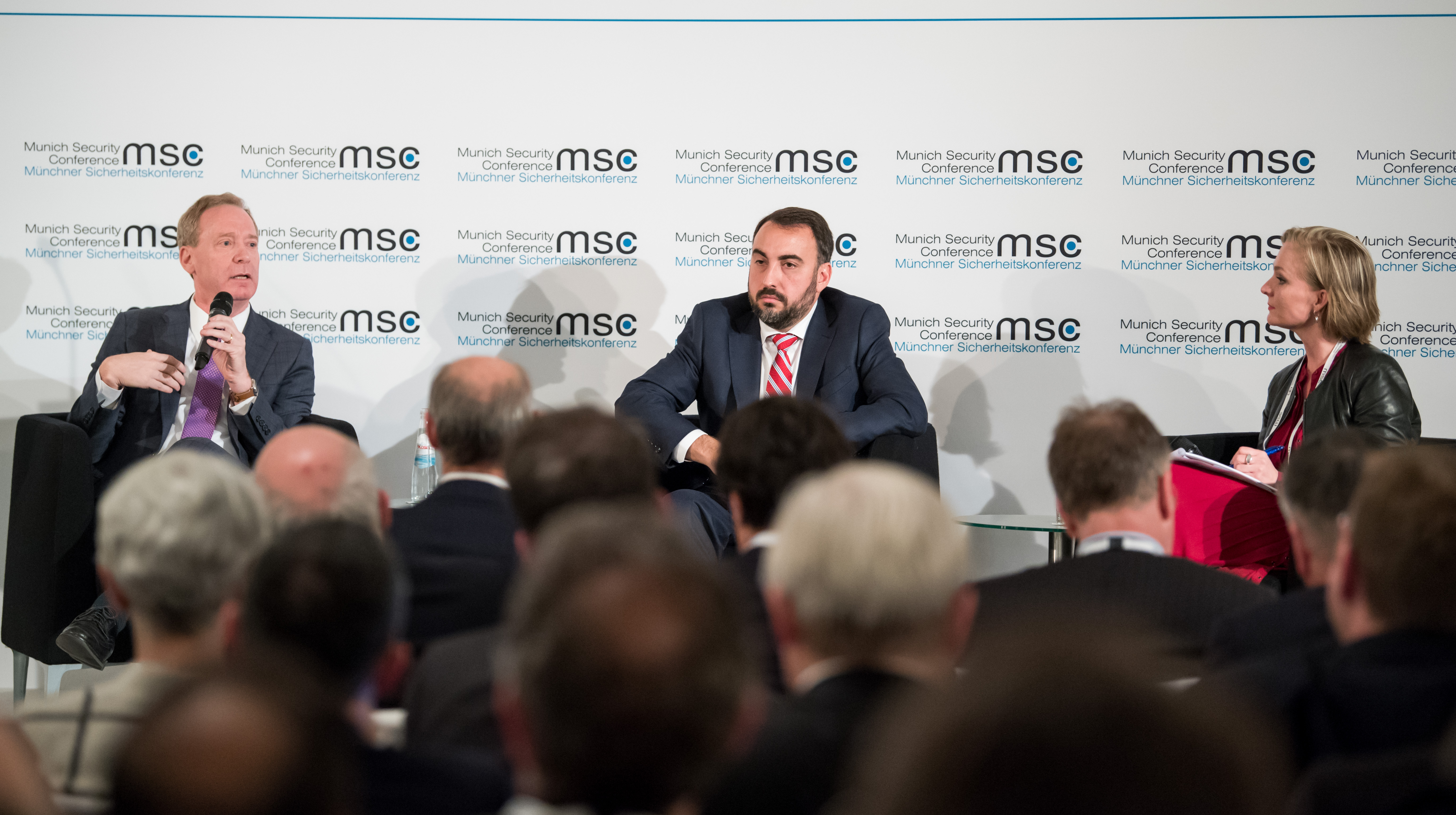 Brad Smith, Alex Stamos und Marietje Schaake während der Münchener Sicherheitskonferenz 2018